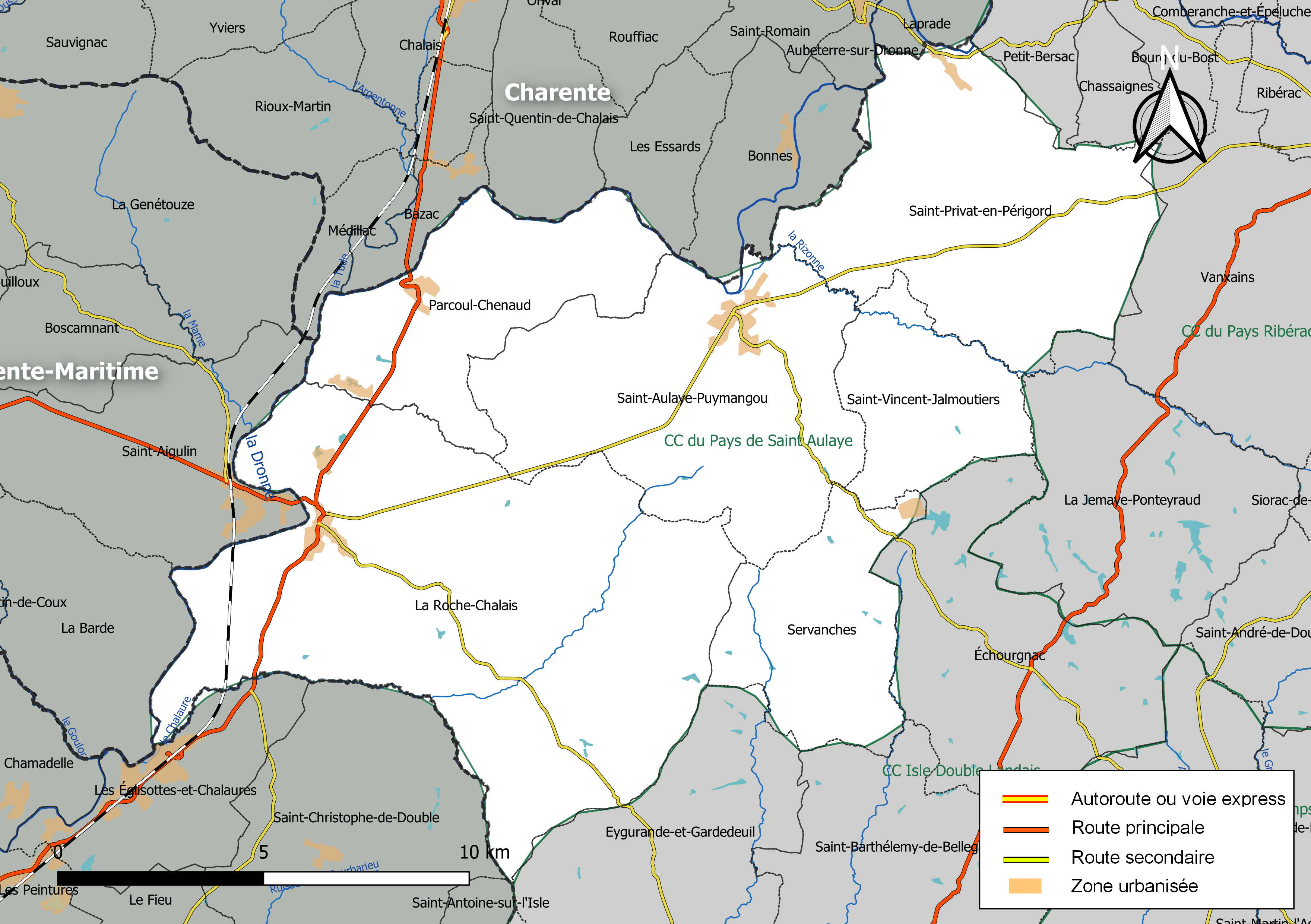 Carte géographique de la Communauté de communes du Pays de Saint-Aulaye, département de la Dordogne, France. Composition au 1er janvier 2019.